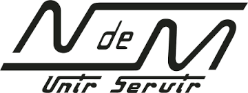 Logotipo de N de M y su lema